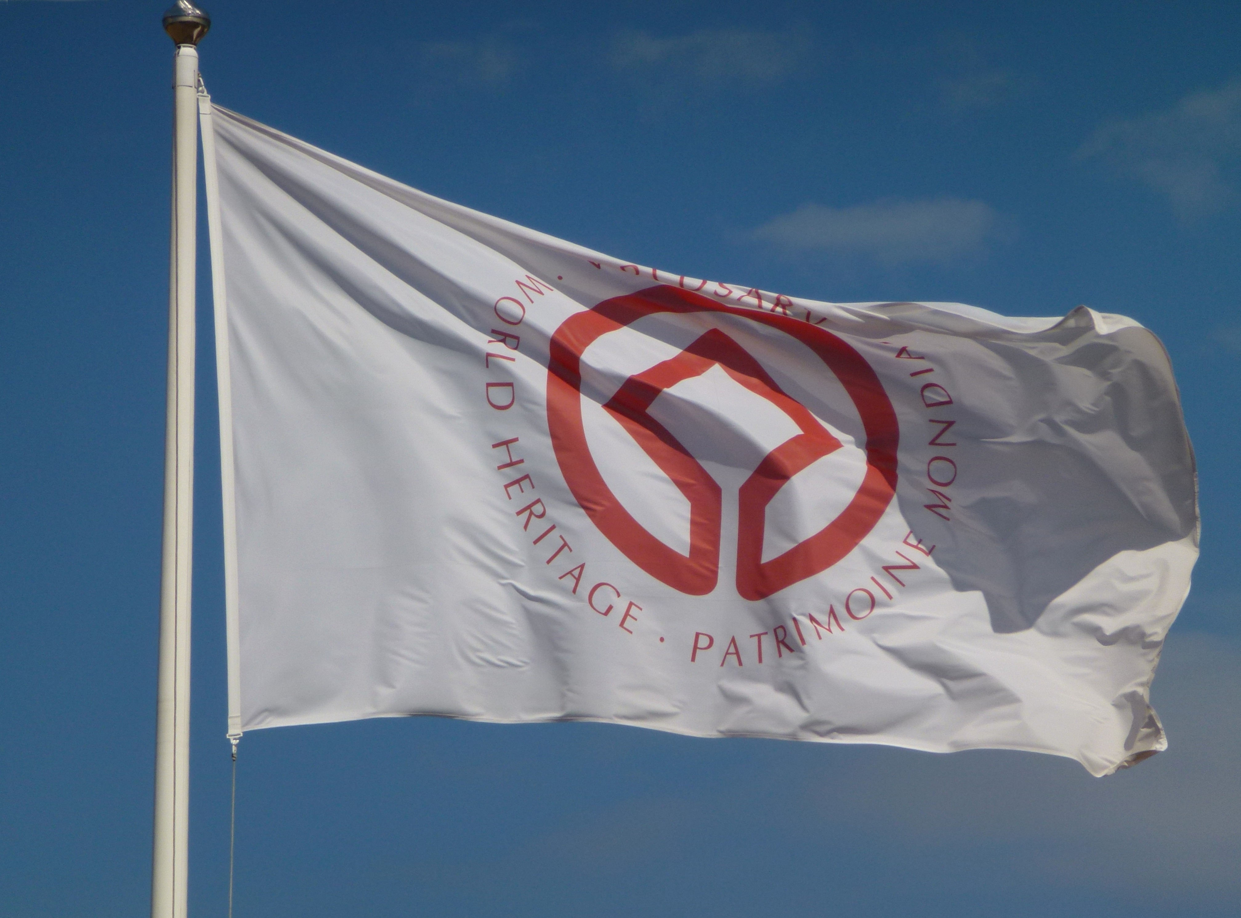 Världsarvsflagga vid Falu gruva